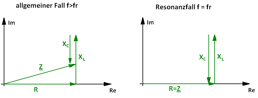 Widerstandsdreicke im allgemeinen und im Resonanzfall